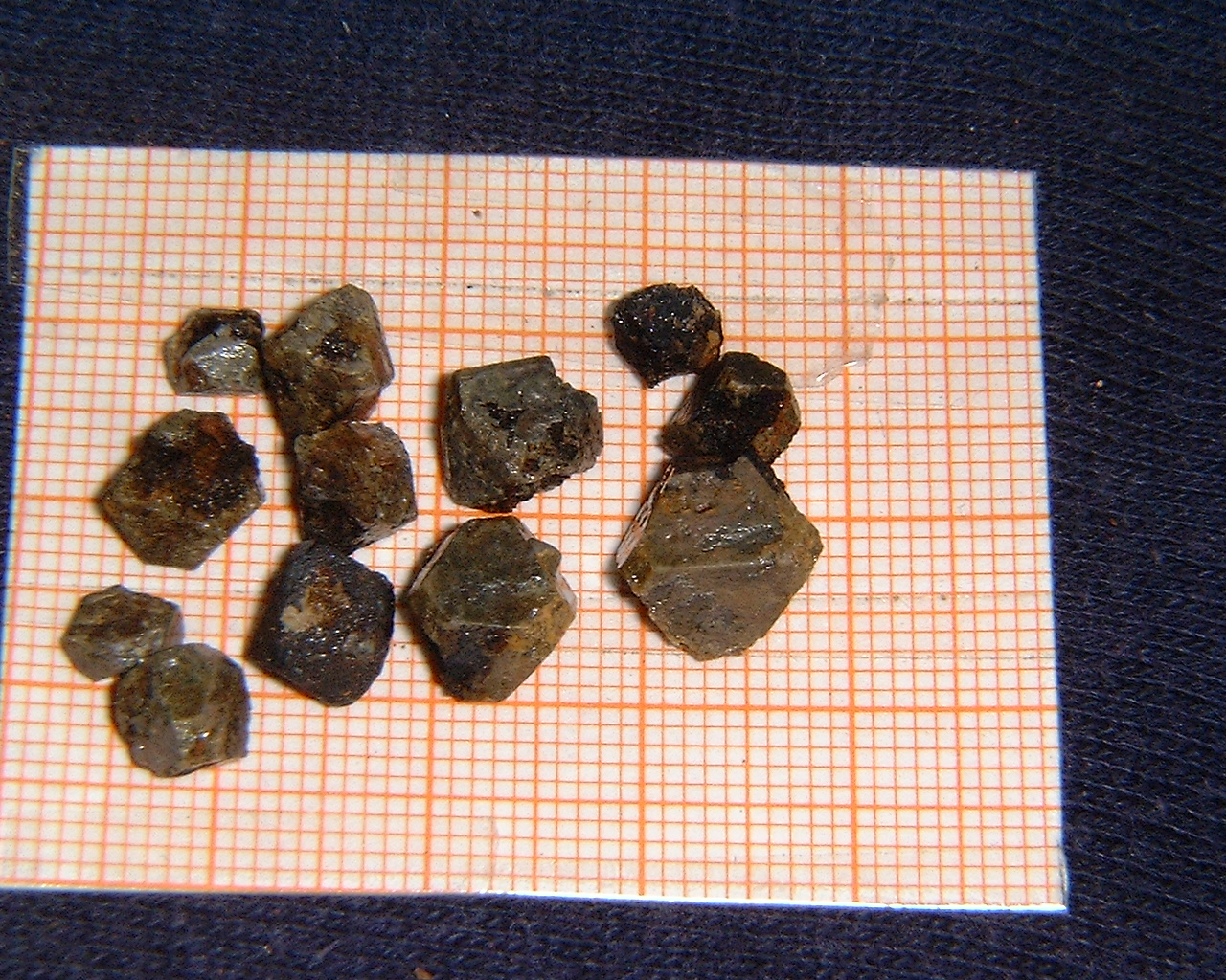 Pyrochlore from Uganda